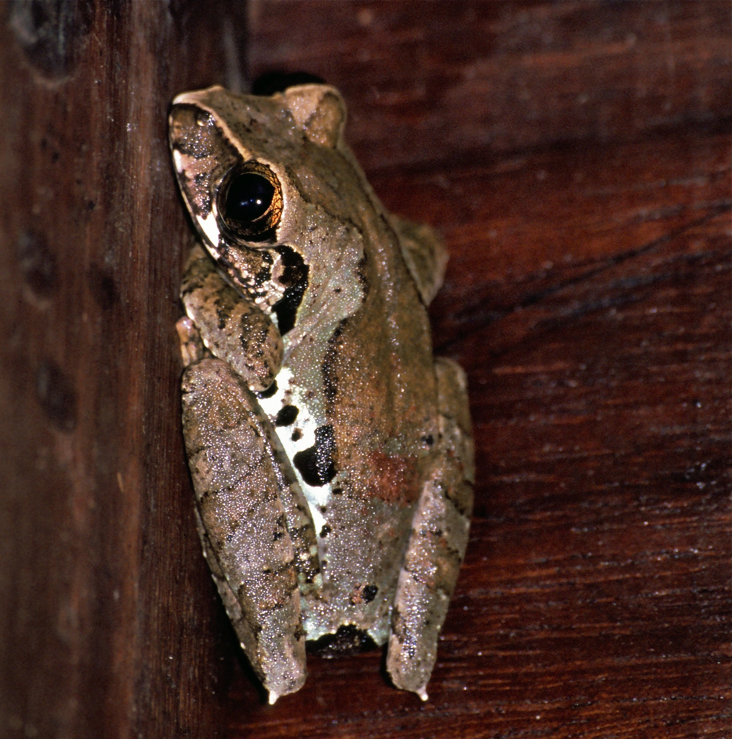 Korup NP, CAMEROON